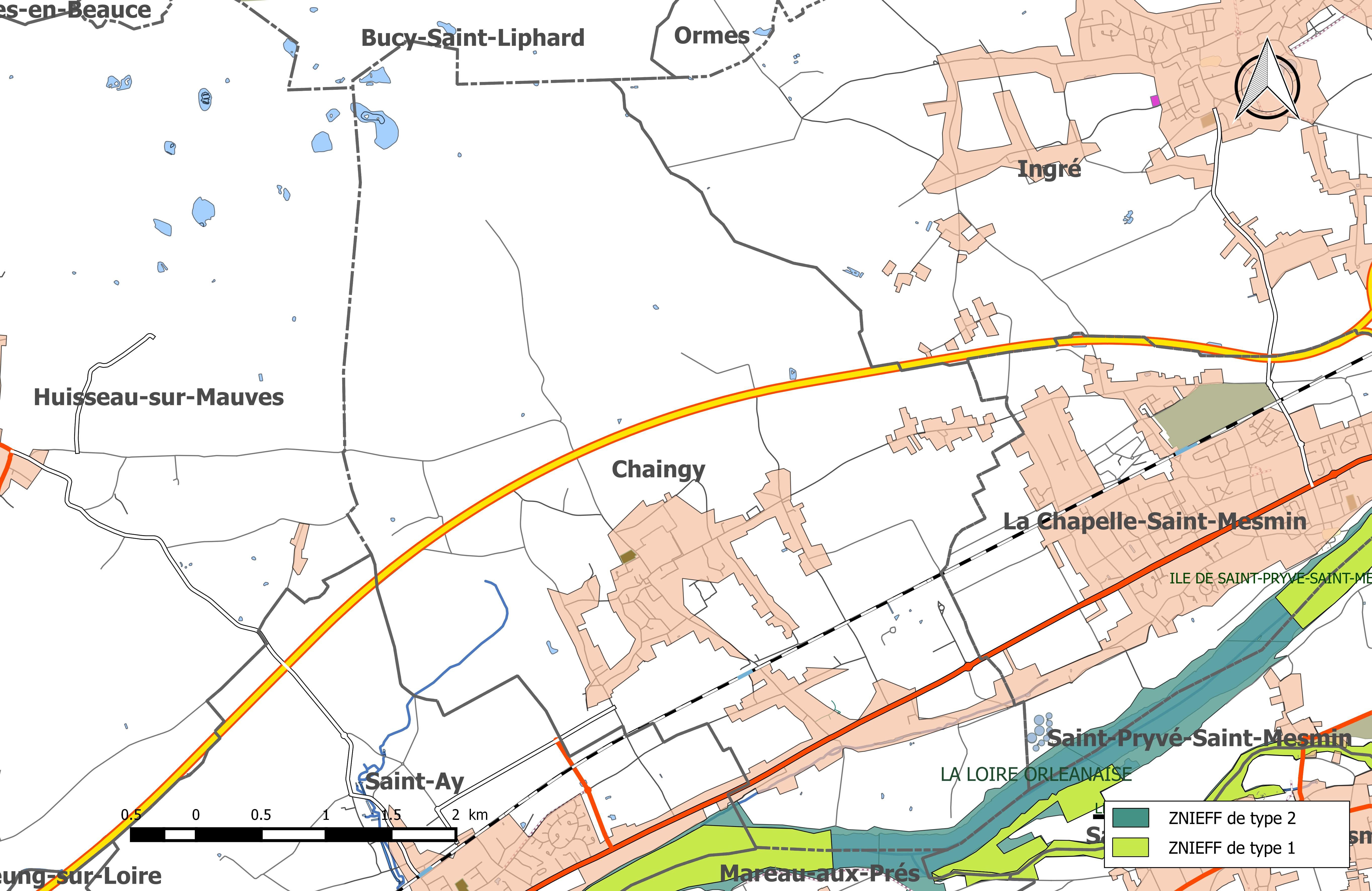 Carte des Zones naturelles d'intérêt écologique faunistique et Floristique (ZNIEFF) de la commune de Chaingy.